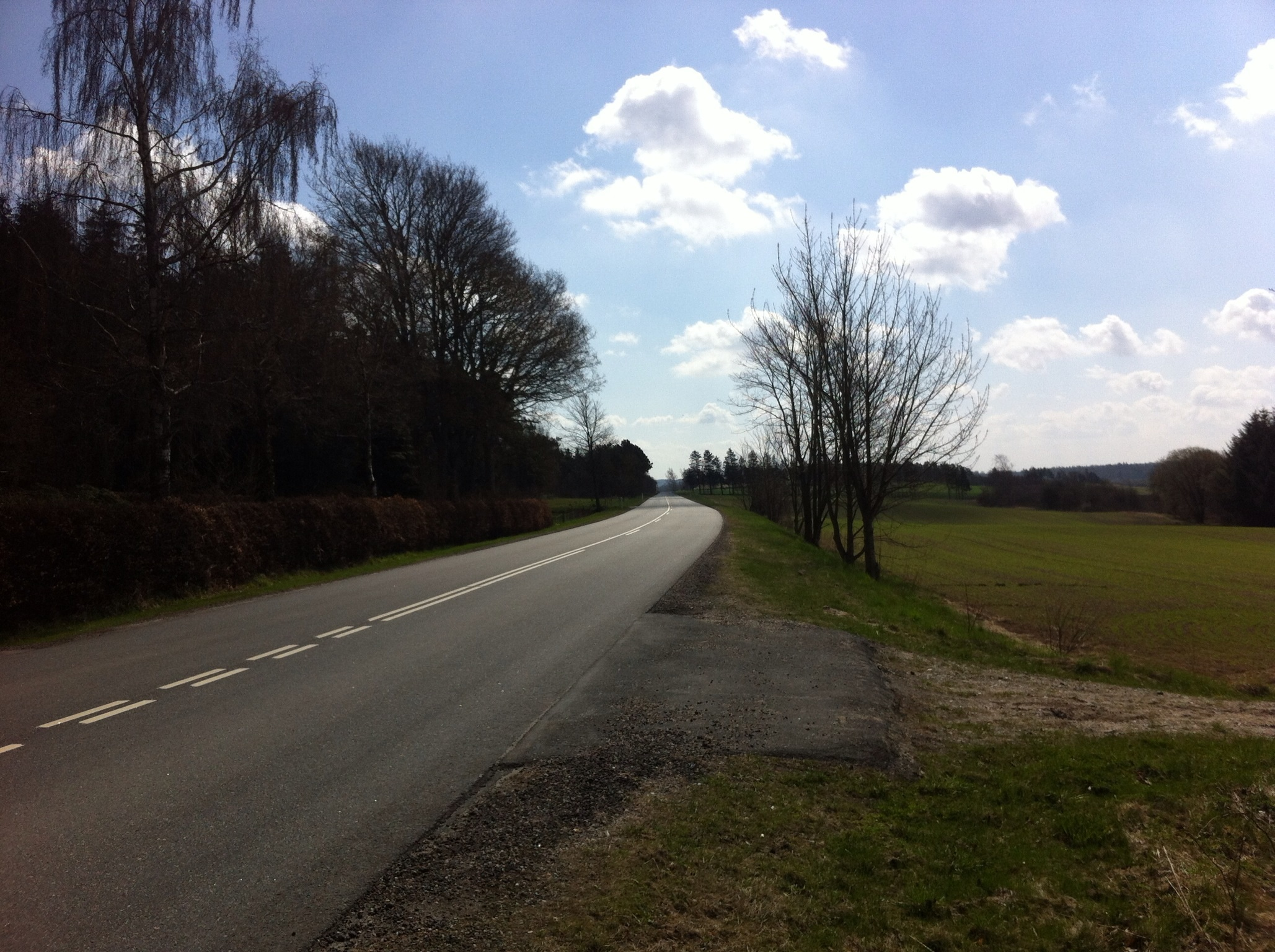 Sekundærrute 519 mellem Astrup og Skørping set mod øst, Møldrupvej, 9510 Arden.